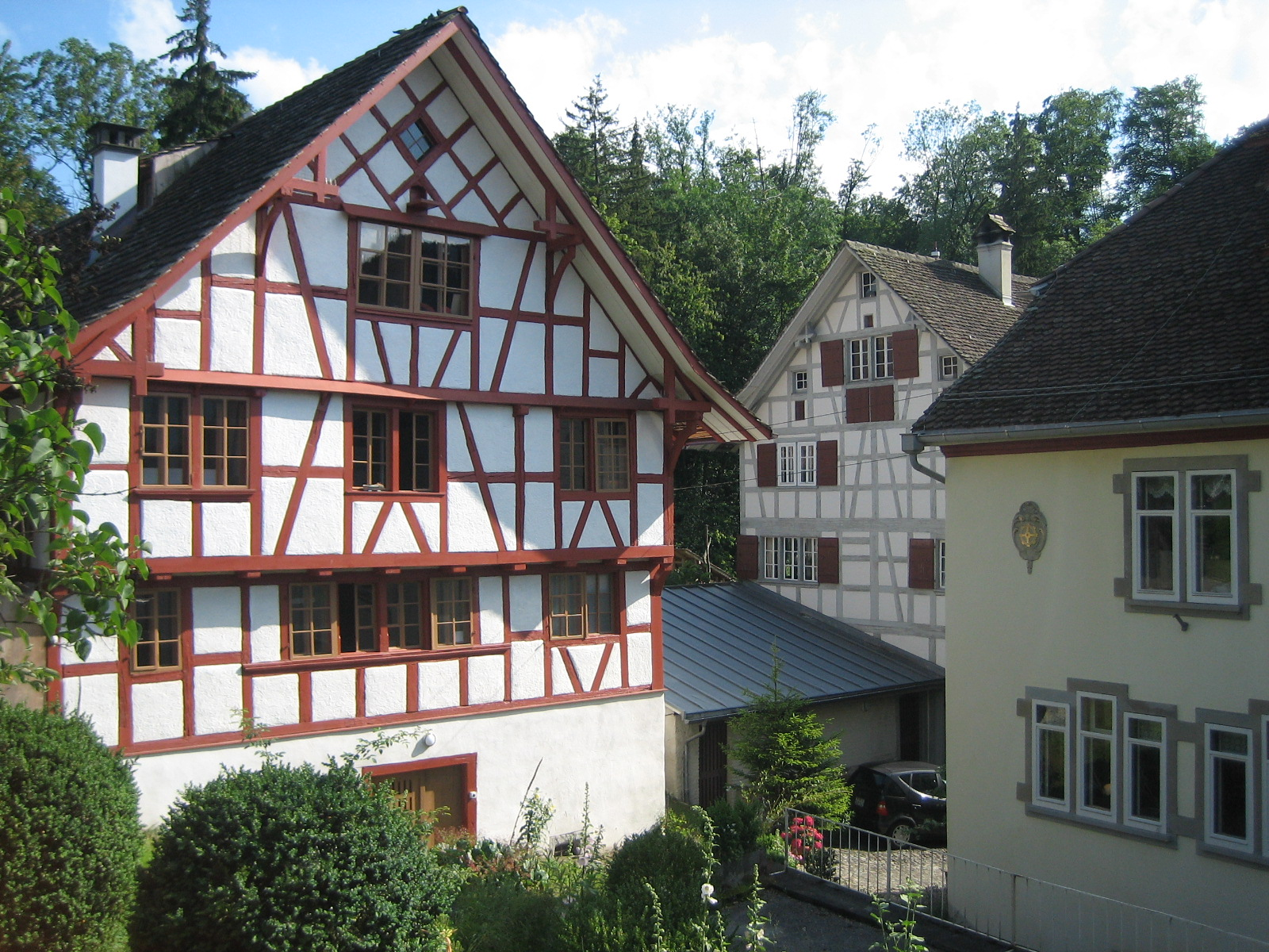 Mühle Hirslanden aus dem 16. Jahrhundert (rechts) mit Knechtenhaus (links) und Lehenhaus (hinten)